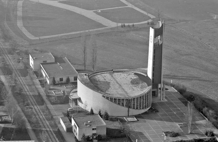 Lörrach: Kirche St. Peter aus der Vogelschau